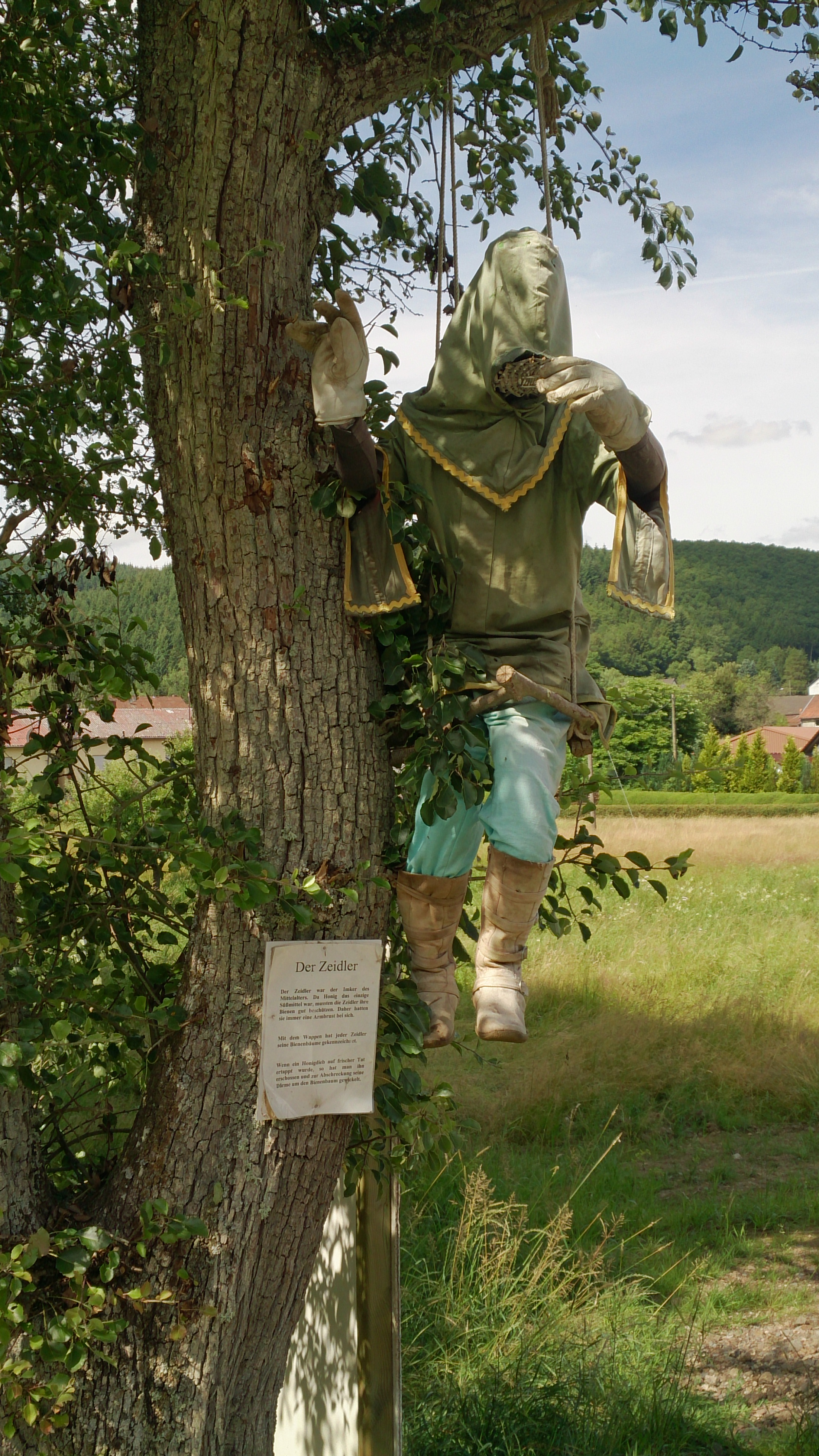 Eine Puppe verkleidet als Zeidler (Waldimker; historisch); aufgenommen in Wallenborn (Vulkaneifel) vor der Imkerei Mehler